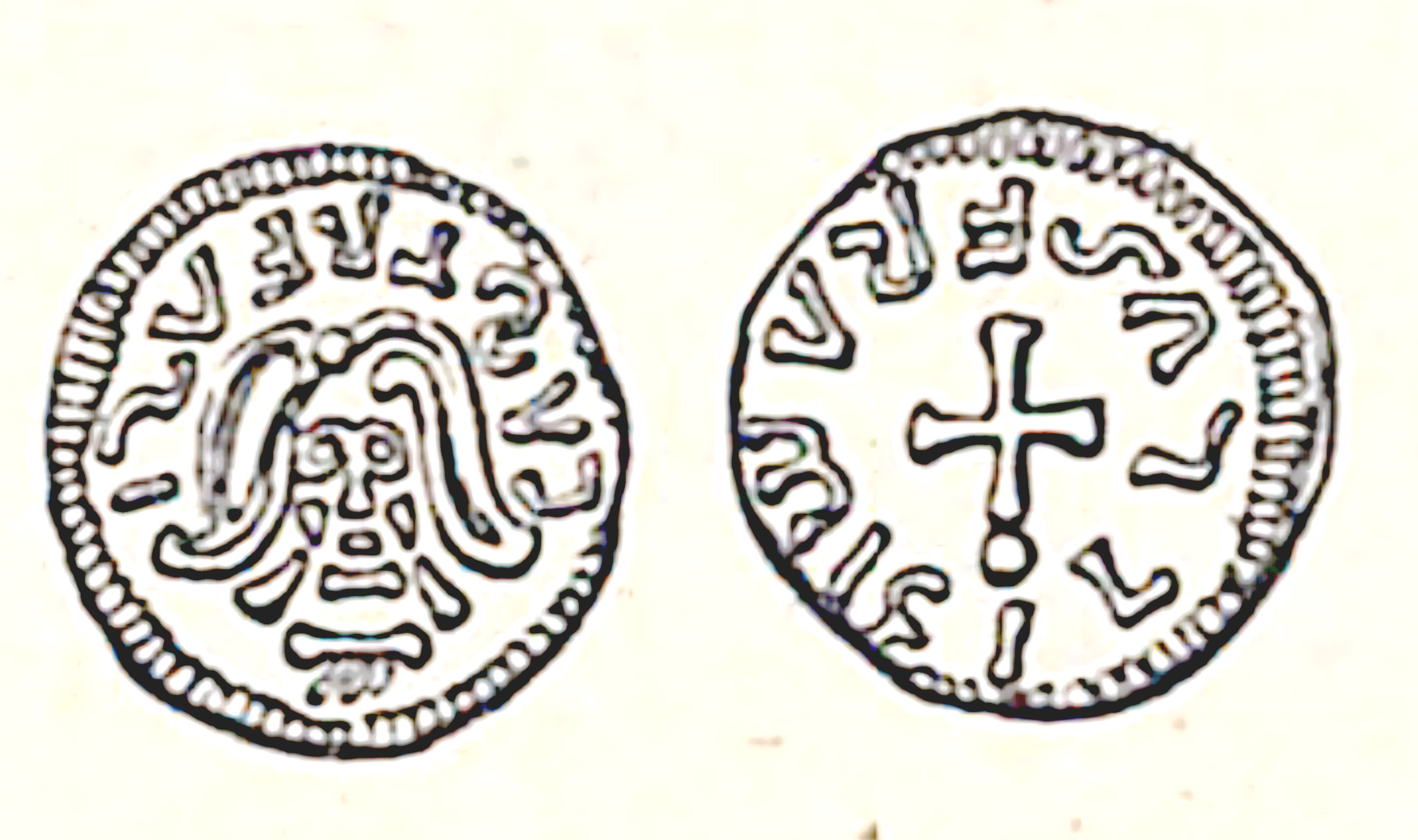 Monnaie mérovingienne frappée dans l'atelier monétaire toulousain de Framigillus (mention "FRAMIGILLVS" au revers) Tiers de sou d'or. Mention à l'avers "CASTR FVSI"